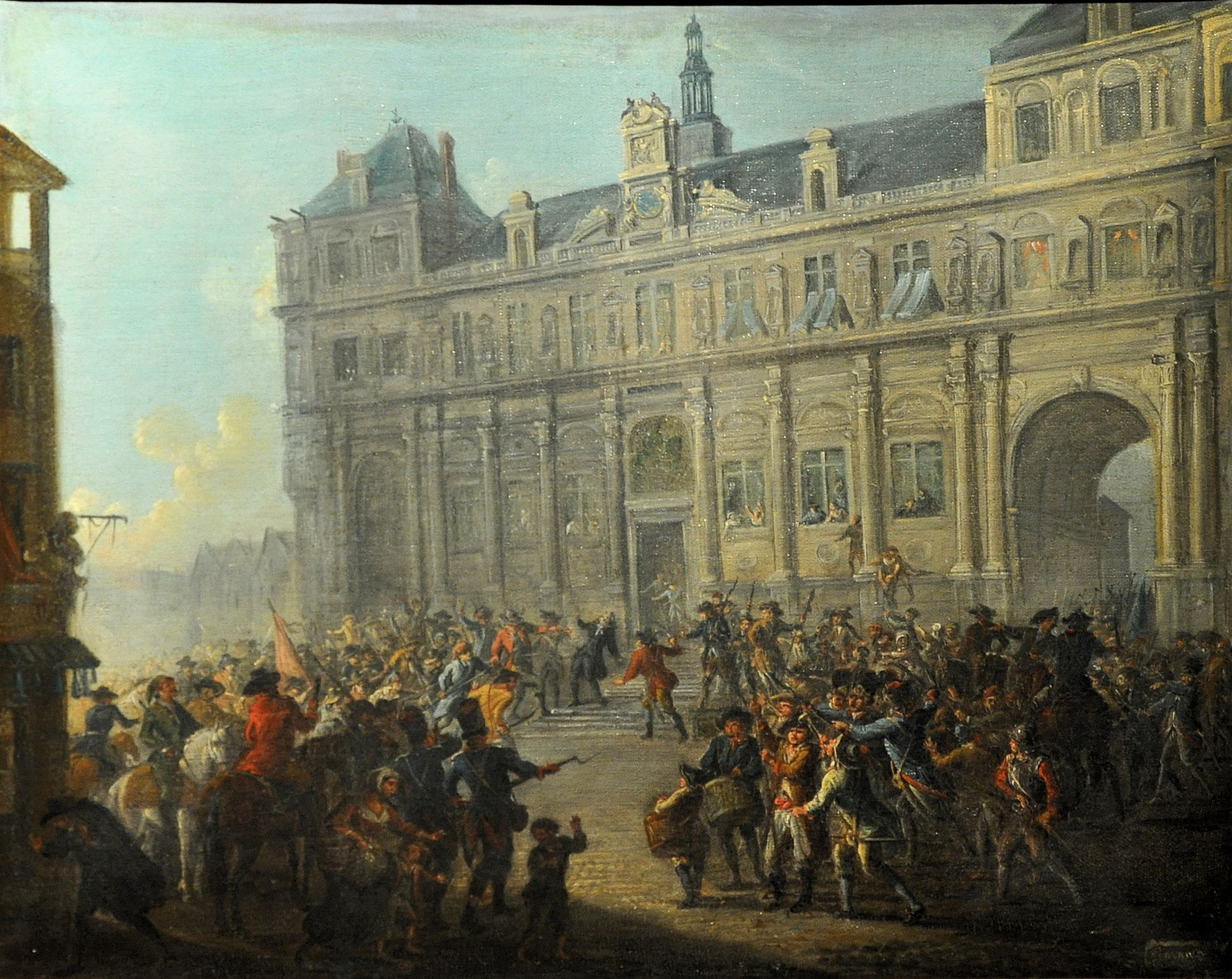 Le Massacre de Jacques de Flesselles (1730-1789), dernier prévôt des Marchands de Paris, devant l'Hôtel de Ville de Paris, le 14 juillet 1789.